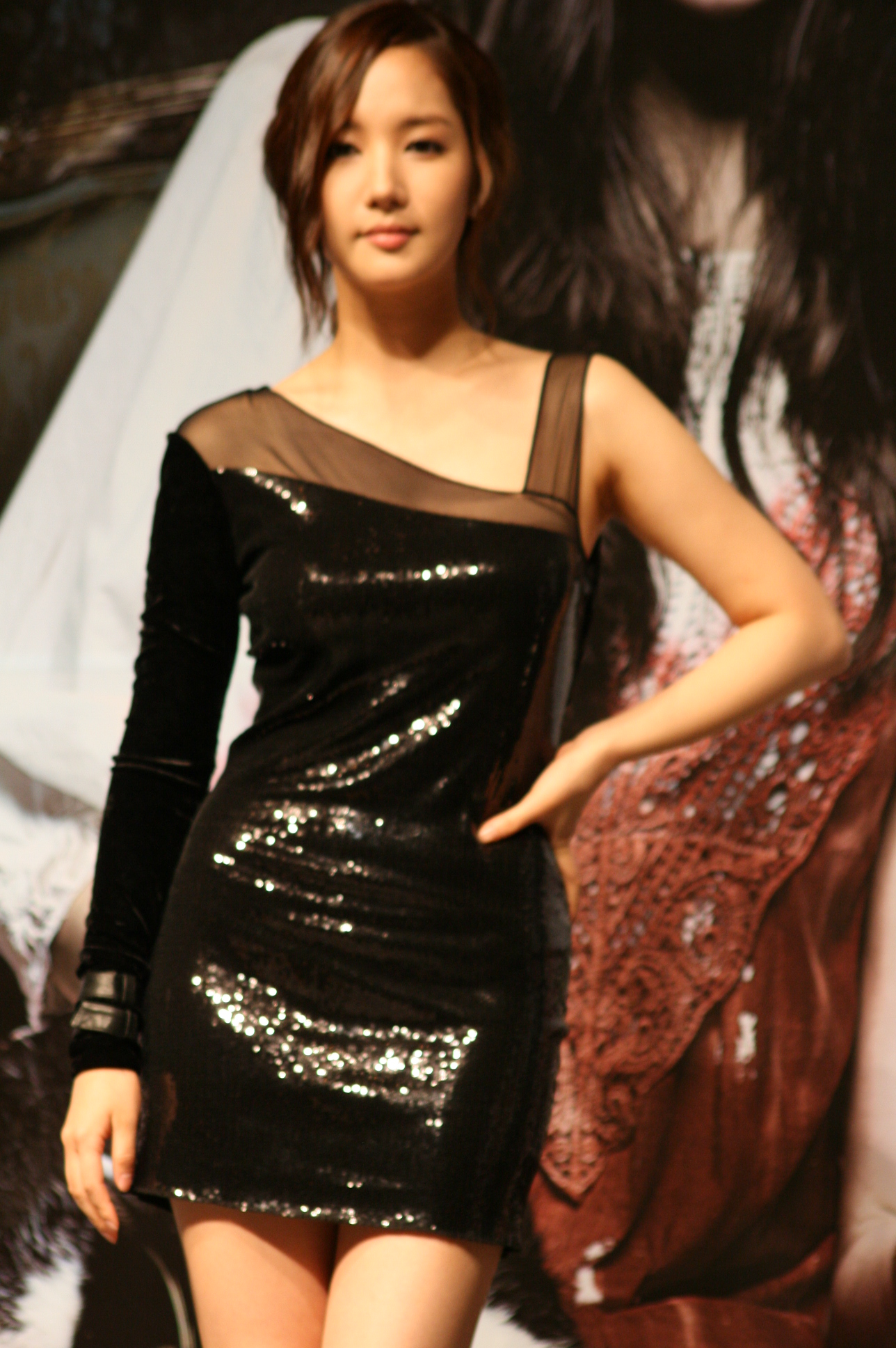 2011년 6월 17일 열린 영화 《고양이: 죽음을 보는 두 개의 눈》 제작보고회에 참석한 박민영.